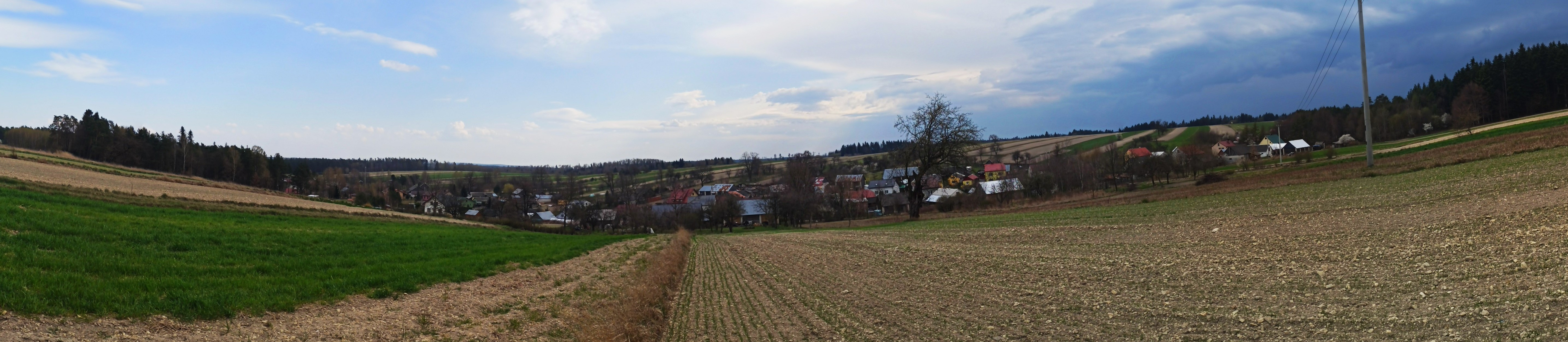 Widok na zachodnią część miejscowości Chyże